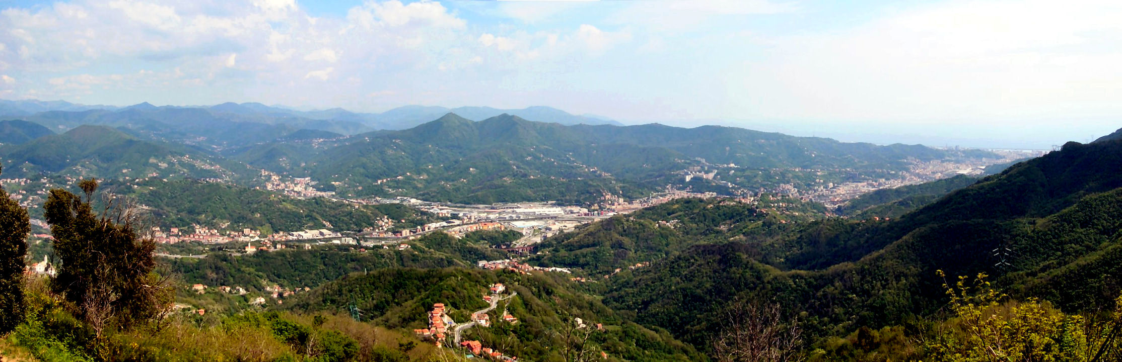 Genova, veduta Valpolcevera